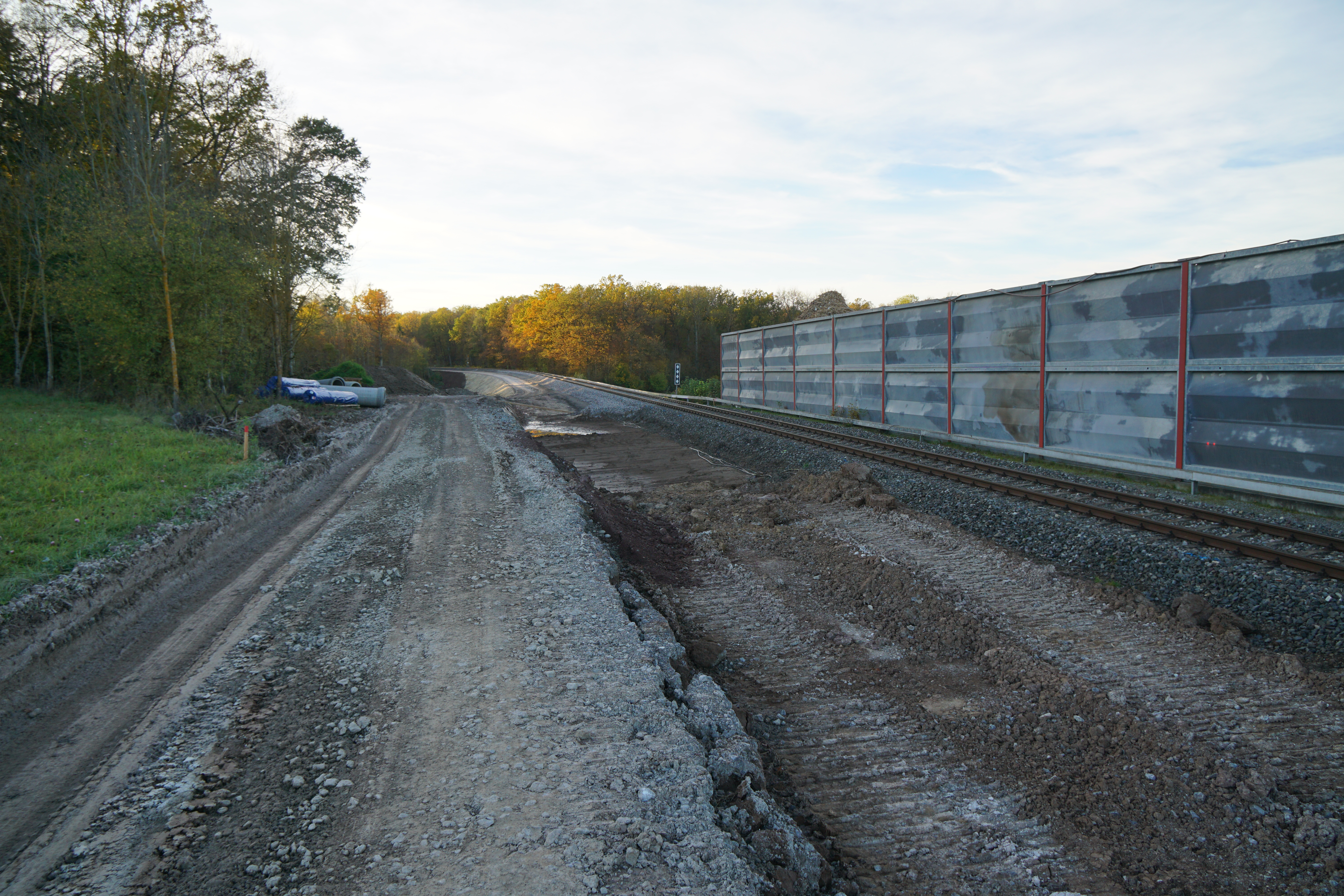 Bauarbeiten beim Bahnhof Breitenholz. Die Ammertalbahn wird an dieser Stelle zweispurig ausgebaut.